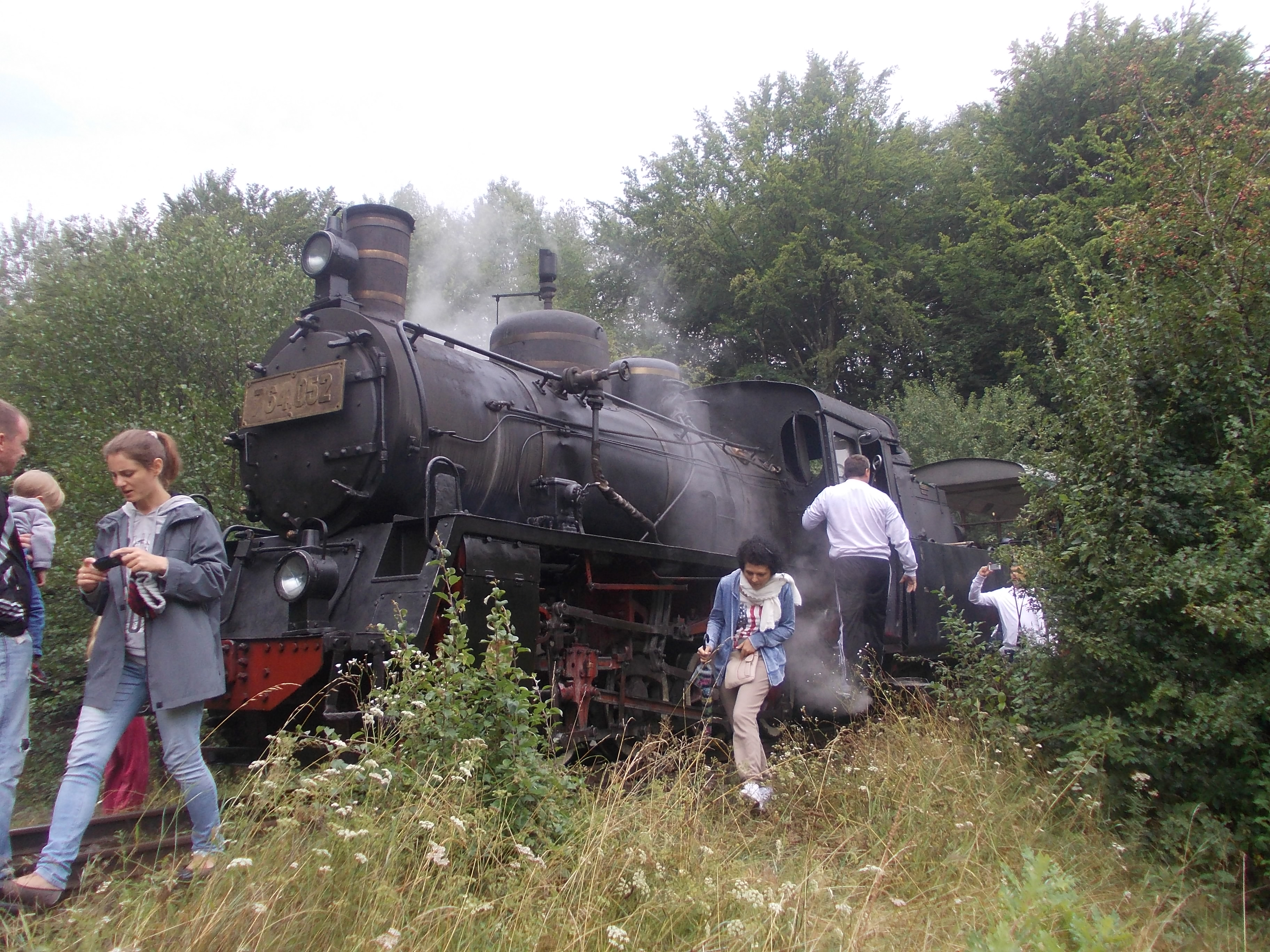 Mocăniţă deraiată lângă Sovata